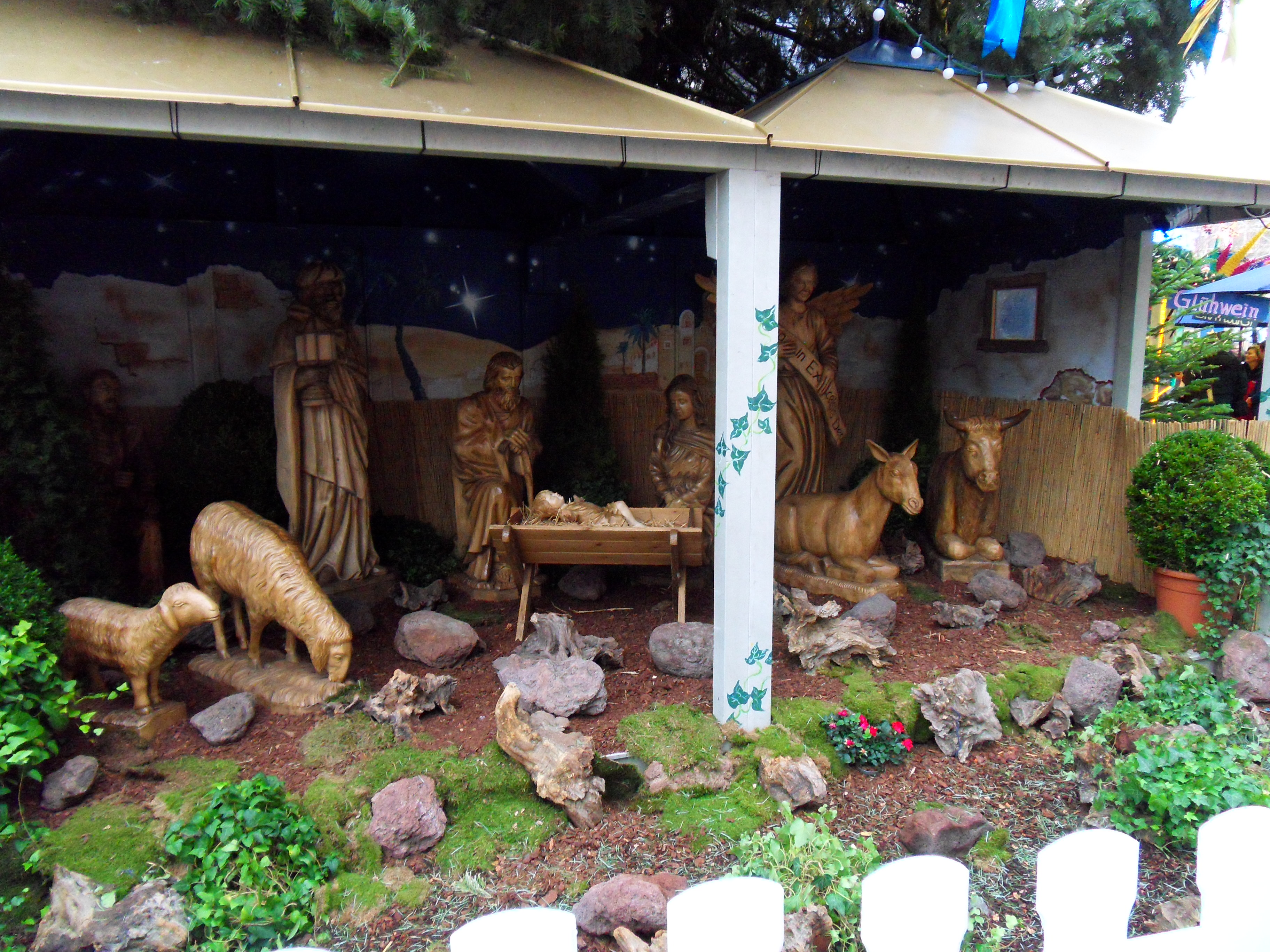 Sternschnuppenmarkt zur Adventszeit auf dem Schloßplatz in Wiesbaden mit Krippenszene unter dem Weihnachtsbaum